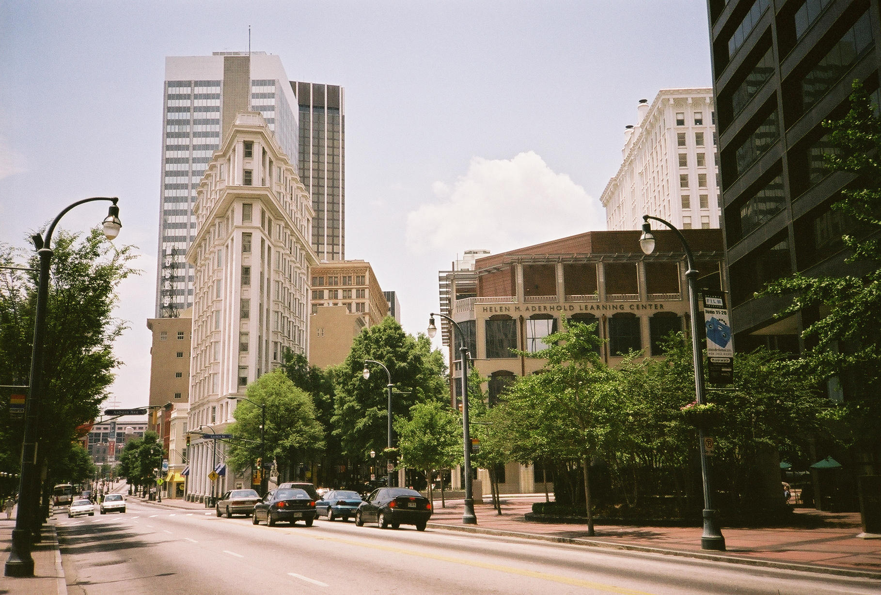 Centre ville d'Atlanta, Géorgie, Etats-Unis